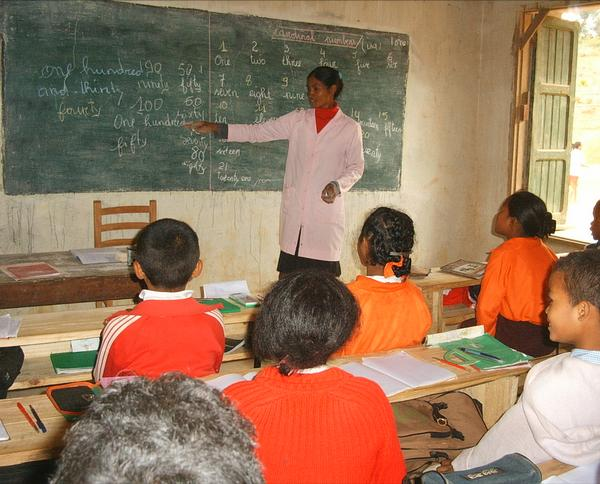 classe de collège